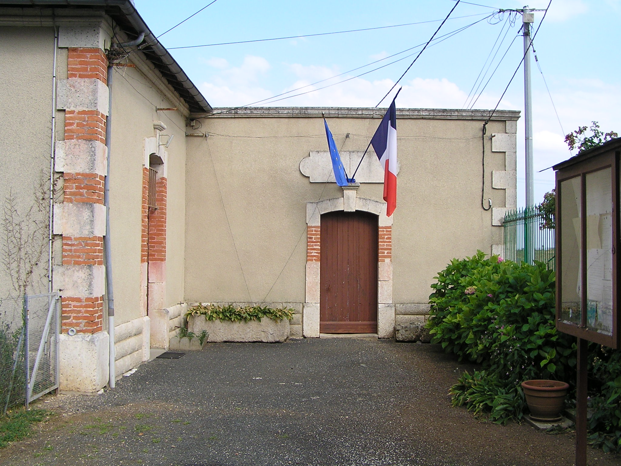 mairie de Villiers-le-Roux